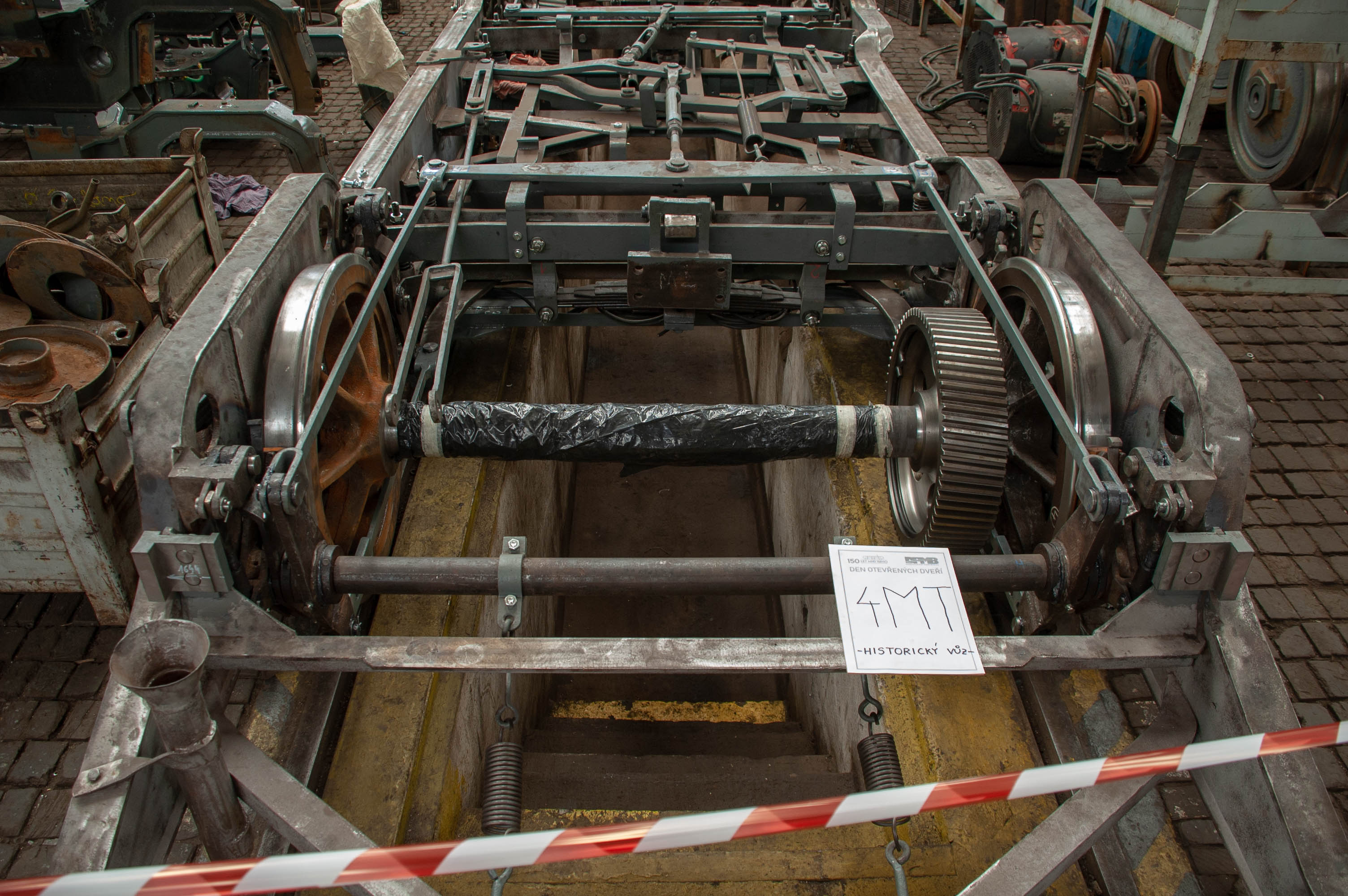 Den otevřených dveří ve vozovně Medlánky v květnu 2019 – tramvaj 4MT během renovace (podvozek)